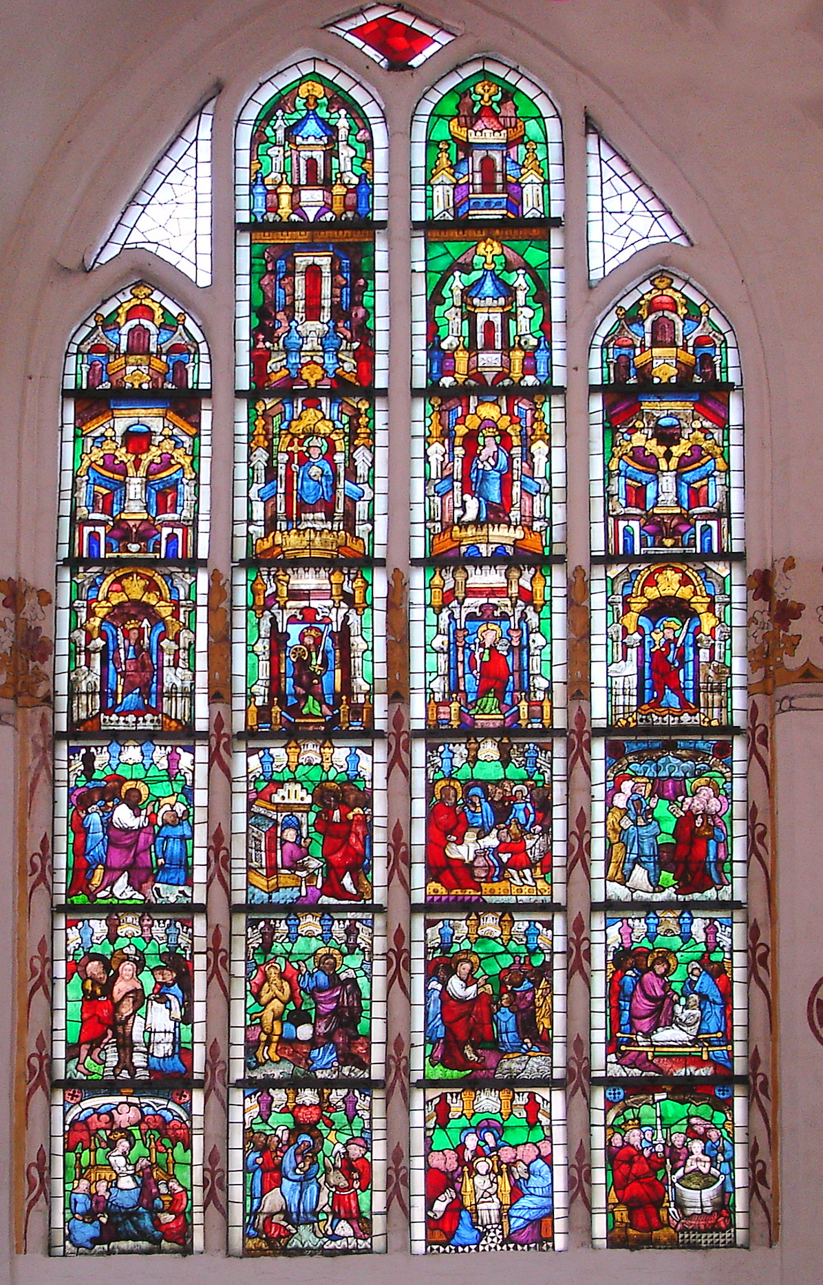 Fenster der Heiligen-Geist-Kirche Wismar, Mecklenburg-Vorpommern